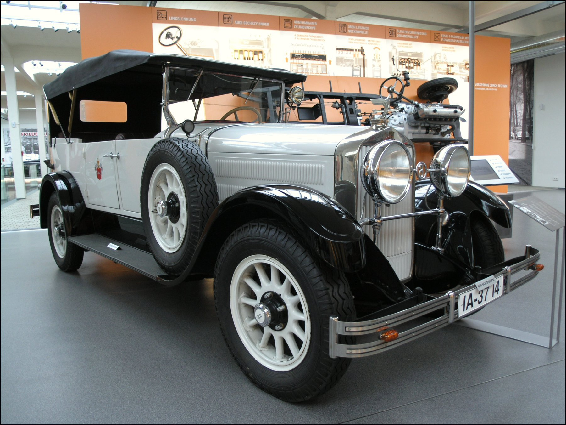 Horch 350 (1929 / 1928-1930 2849 vozů